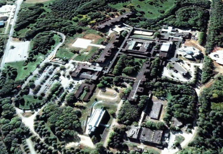 Vista aerea dell'ASO S.Luigi Gonzaga di Orbassano (TO), Italia